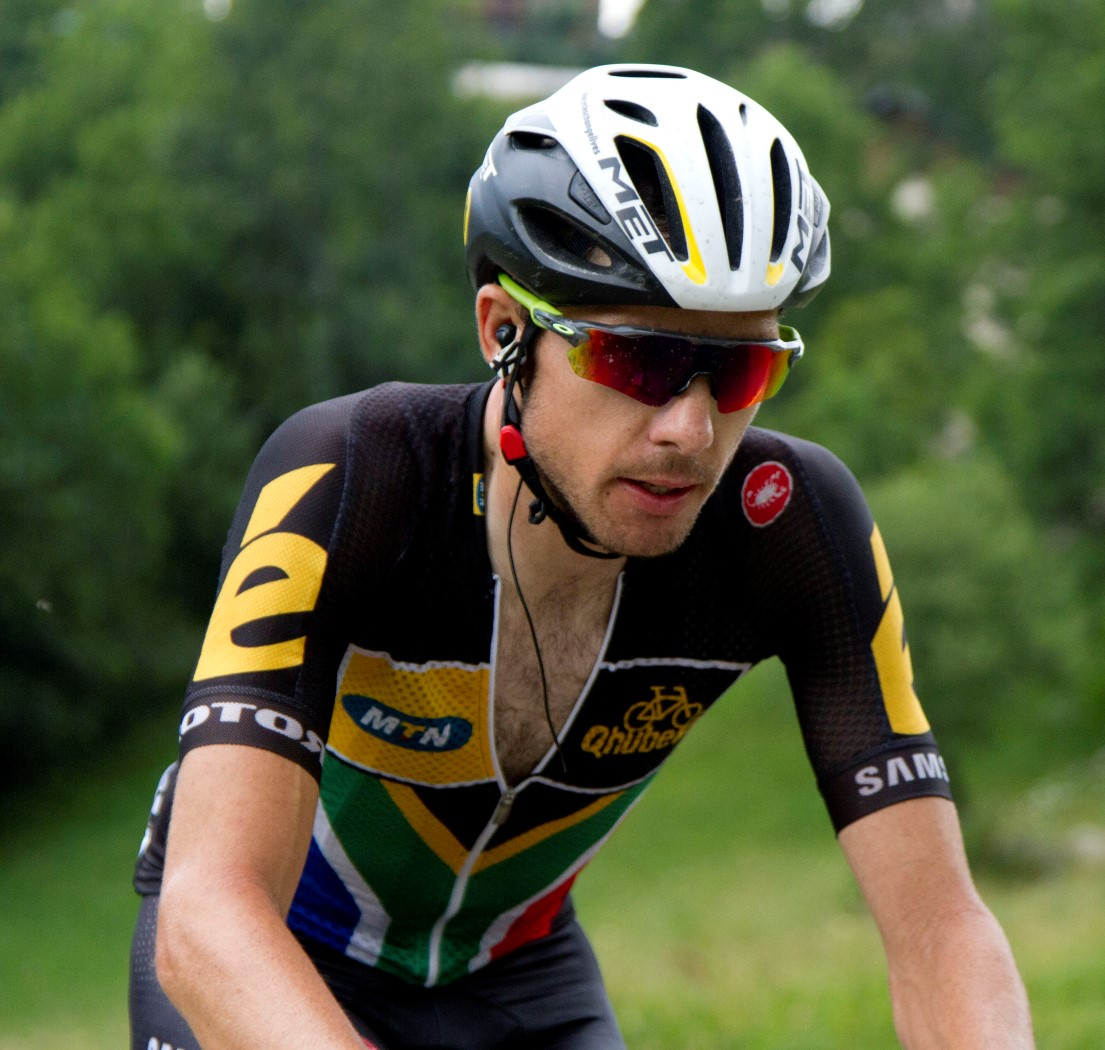 208 janse van rensburg